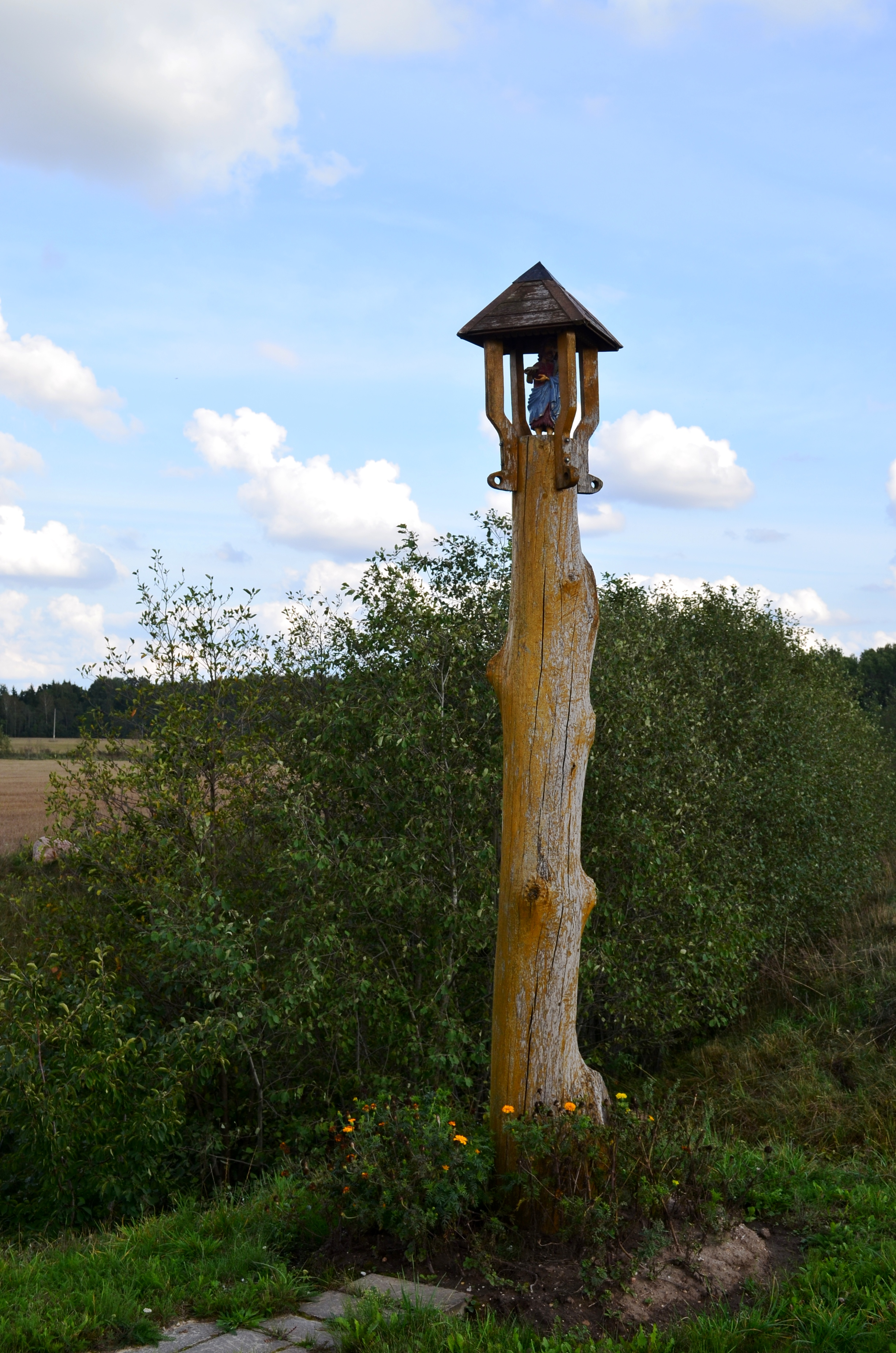 Koplytstulpis Legečių k., Radviliškio raj.